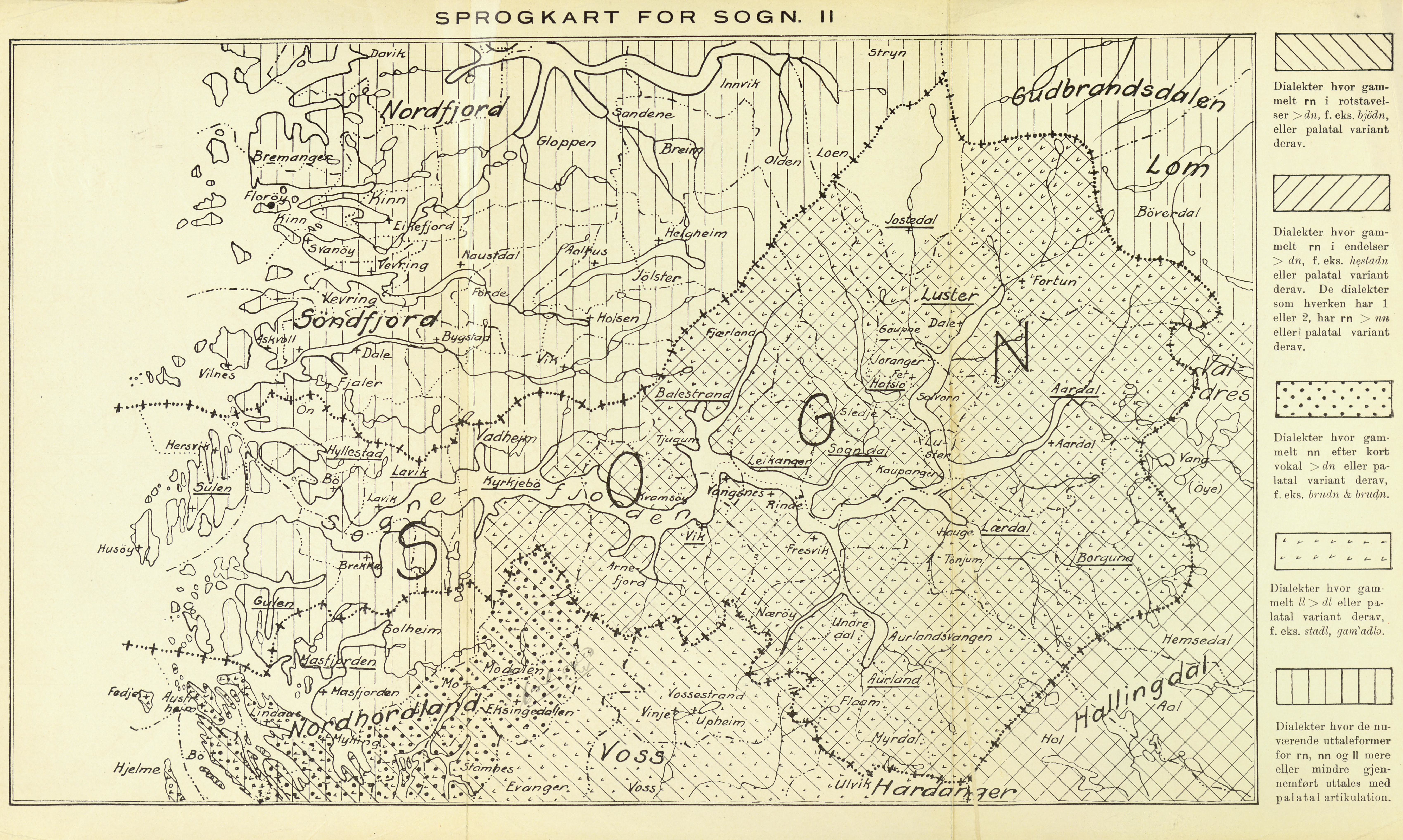 «Sprogkart for Sogn II» i Amund B. Larsen: Sognemålene. Oslo: Jacob Dybwad, 1922